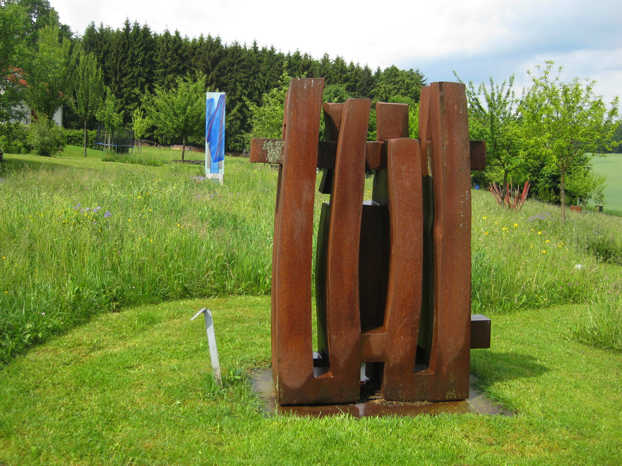 Jörg Bach, Lavinium, 1996, - Deutschland, Baden-Württemberg, Rottweil-Hausen, KUNSTdünger Skulpturenfeld